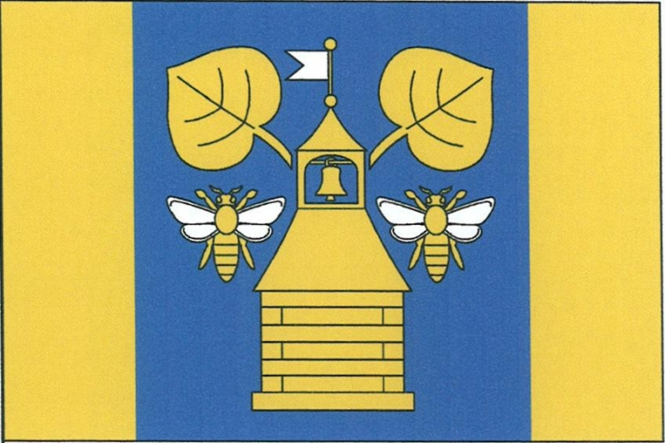 vlajka, Horní Libochová, okres Žďár nad Sázavou